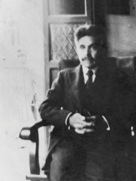 Alberto Masferrer ensayista, libre pensador.